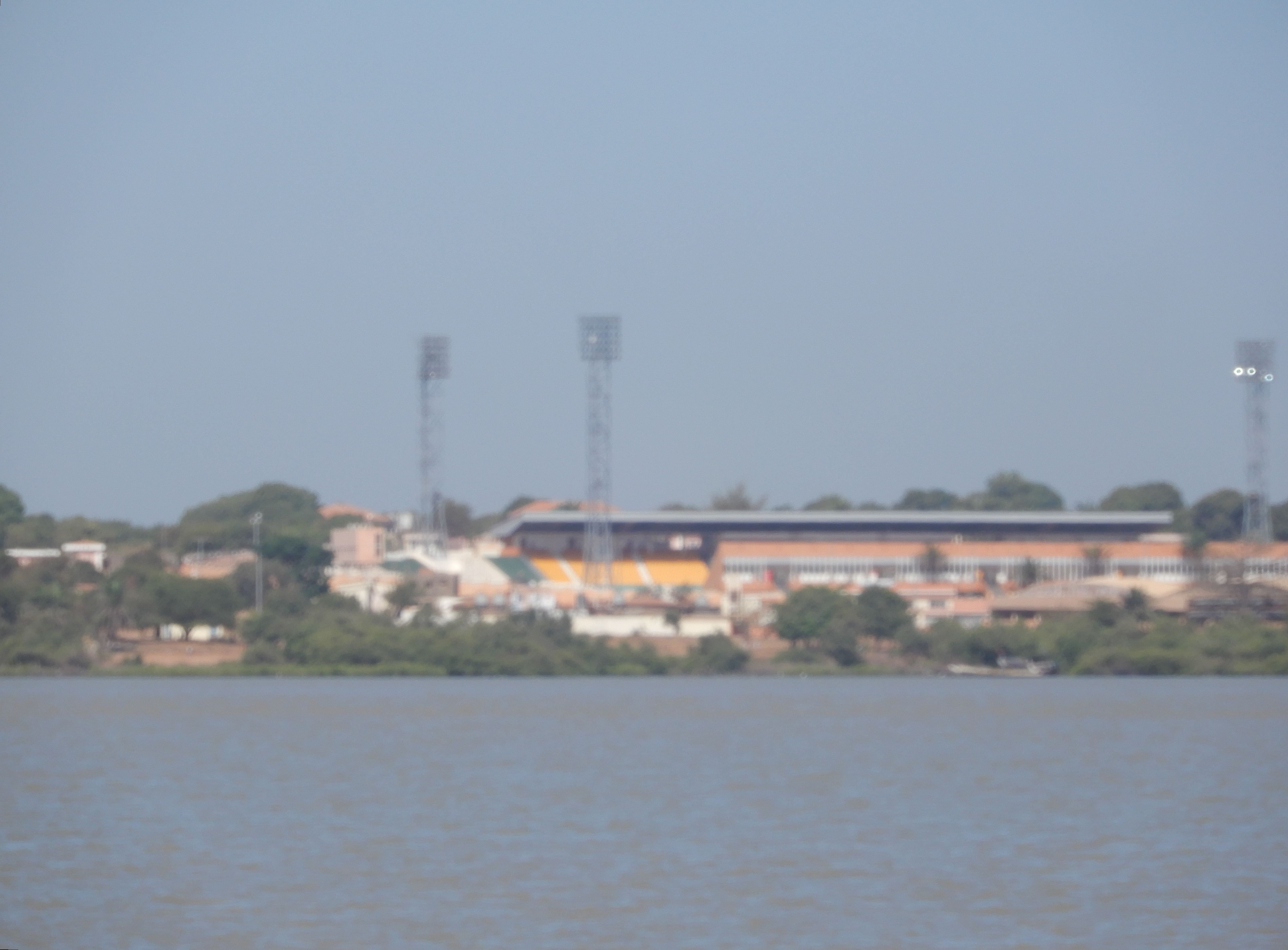 Viagem de Bissau para Bolama, Guiné-Bissau